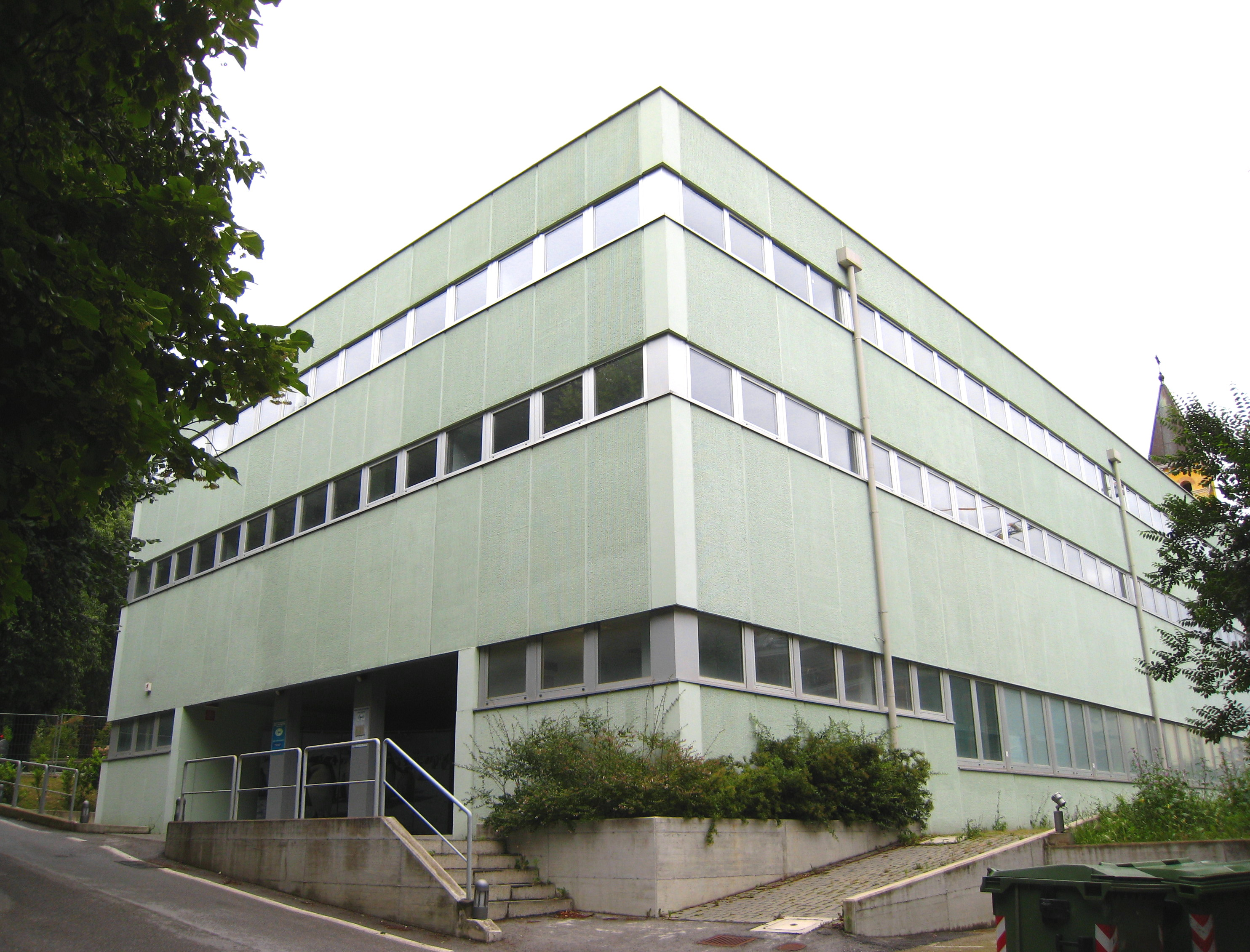 Museo dell'Antartide - sede di Trieste - Giugno 2008